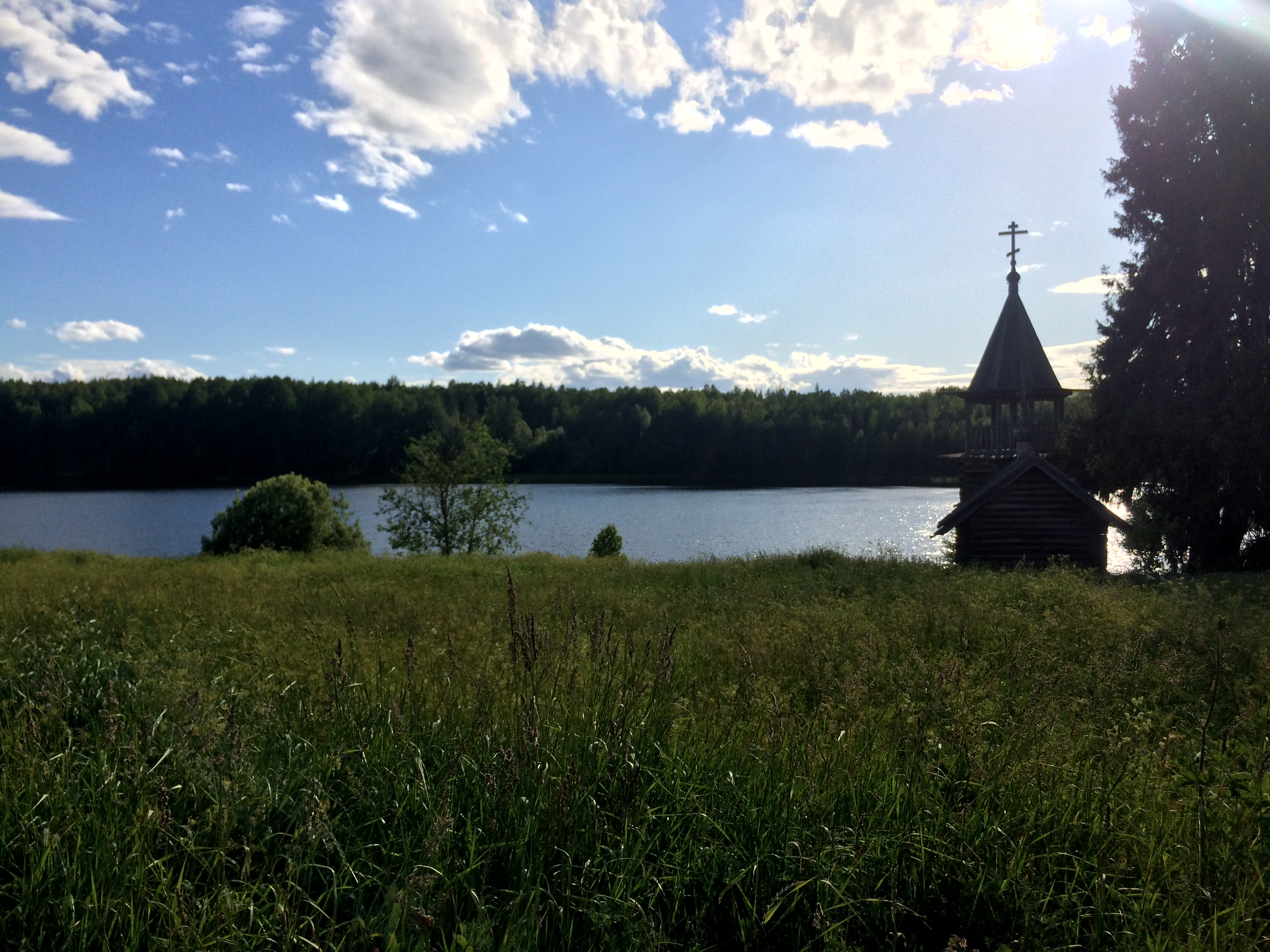 Космозеро (деревня)